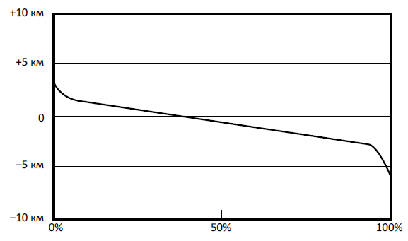 Гипсографическая кривая Луны. По данным Шопф Т. Палеоокеанология: Пер. с англ. — М.: Мир, 1982. — 311 с., ил.